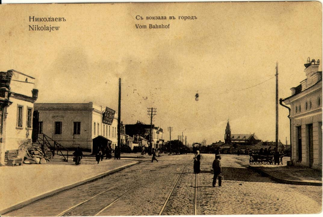 „Nikolajew. Vom Bahnhof“